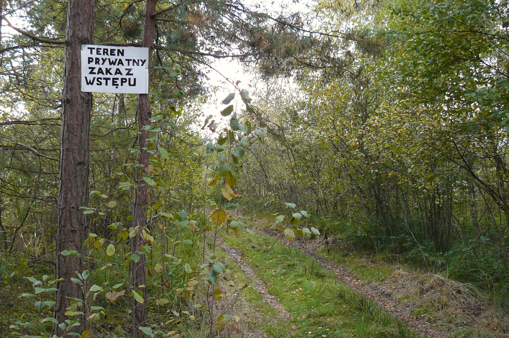 Droga na terenie Bagna Chlebowo.